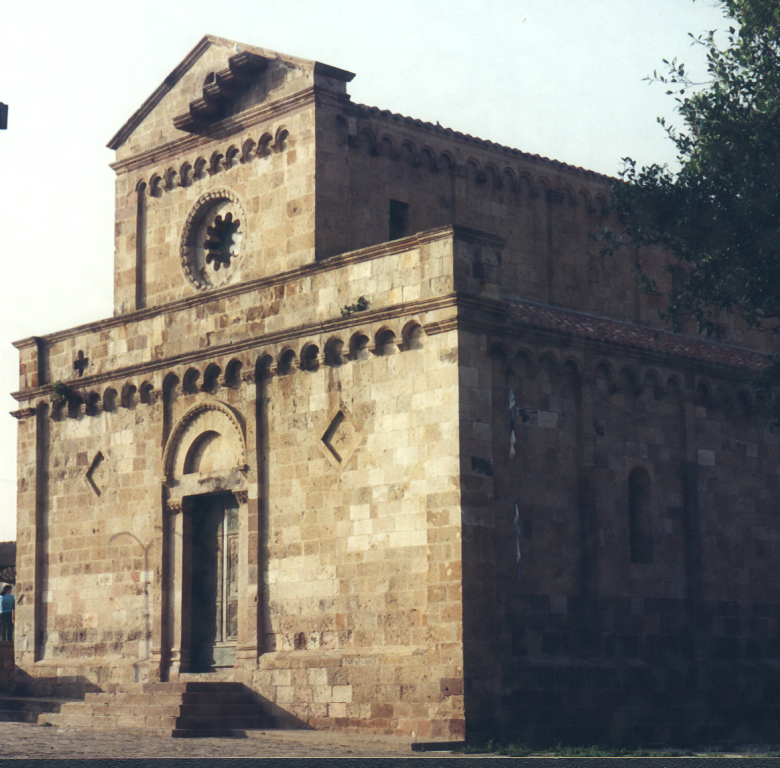 Chiesa romanica di Santa Maria a Tratalias (Carbonia-Iglesias)